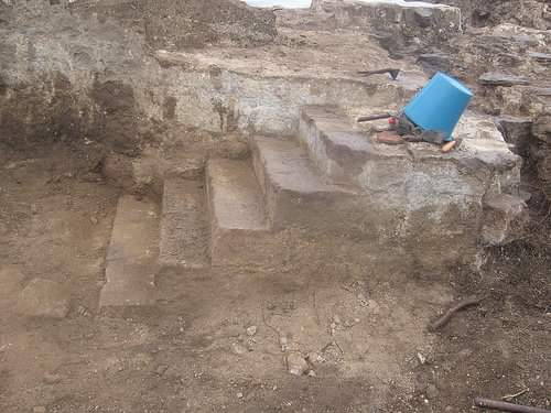 Lurazpian zegoen Amaiurko eskailerak azaleratu zitzuten arkeologoek